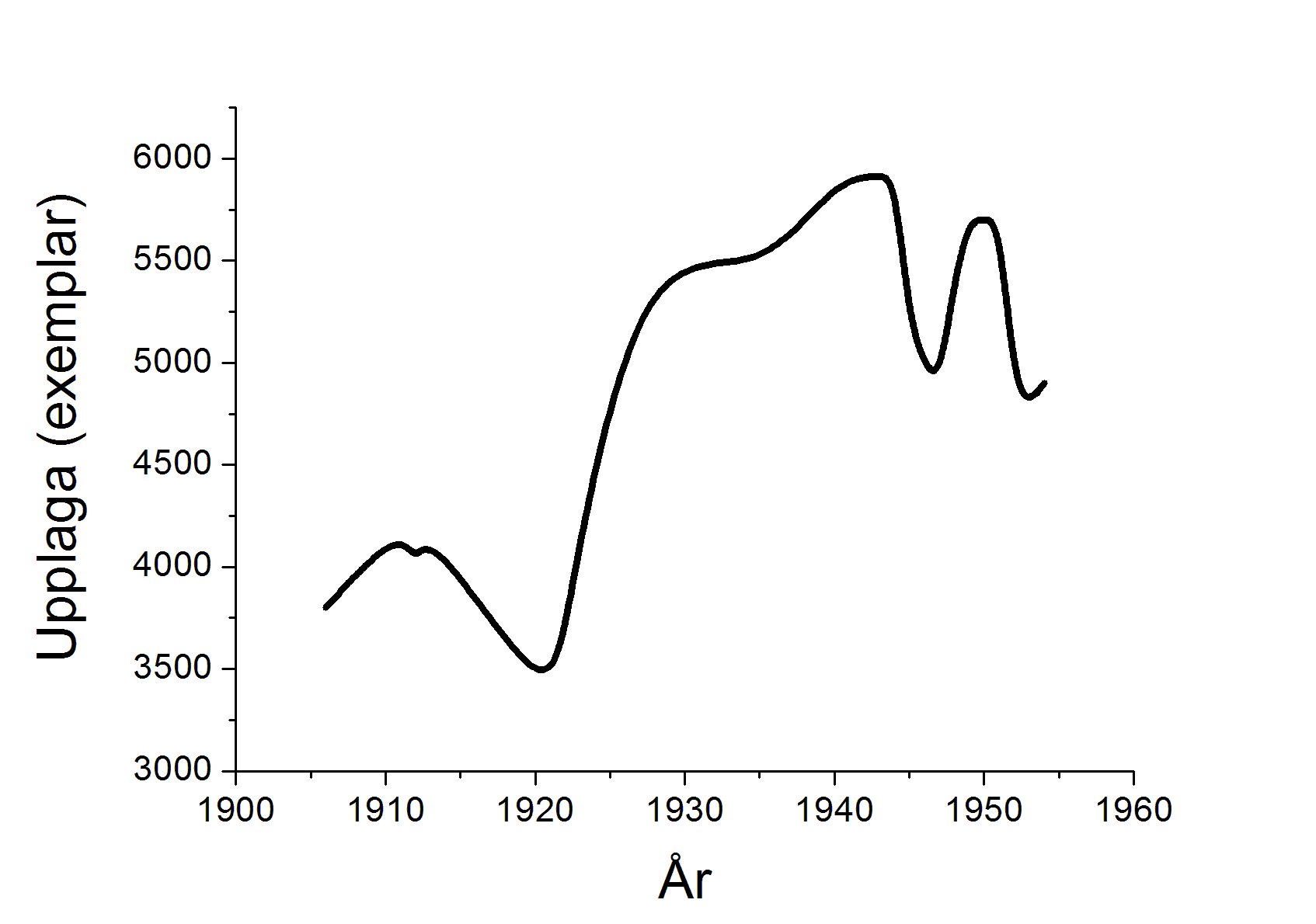 Diagram över tidningen Hallands upplaga, baserat på